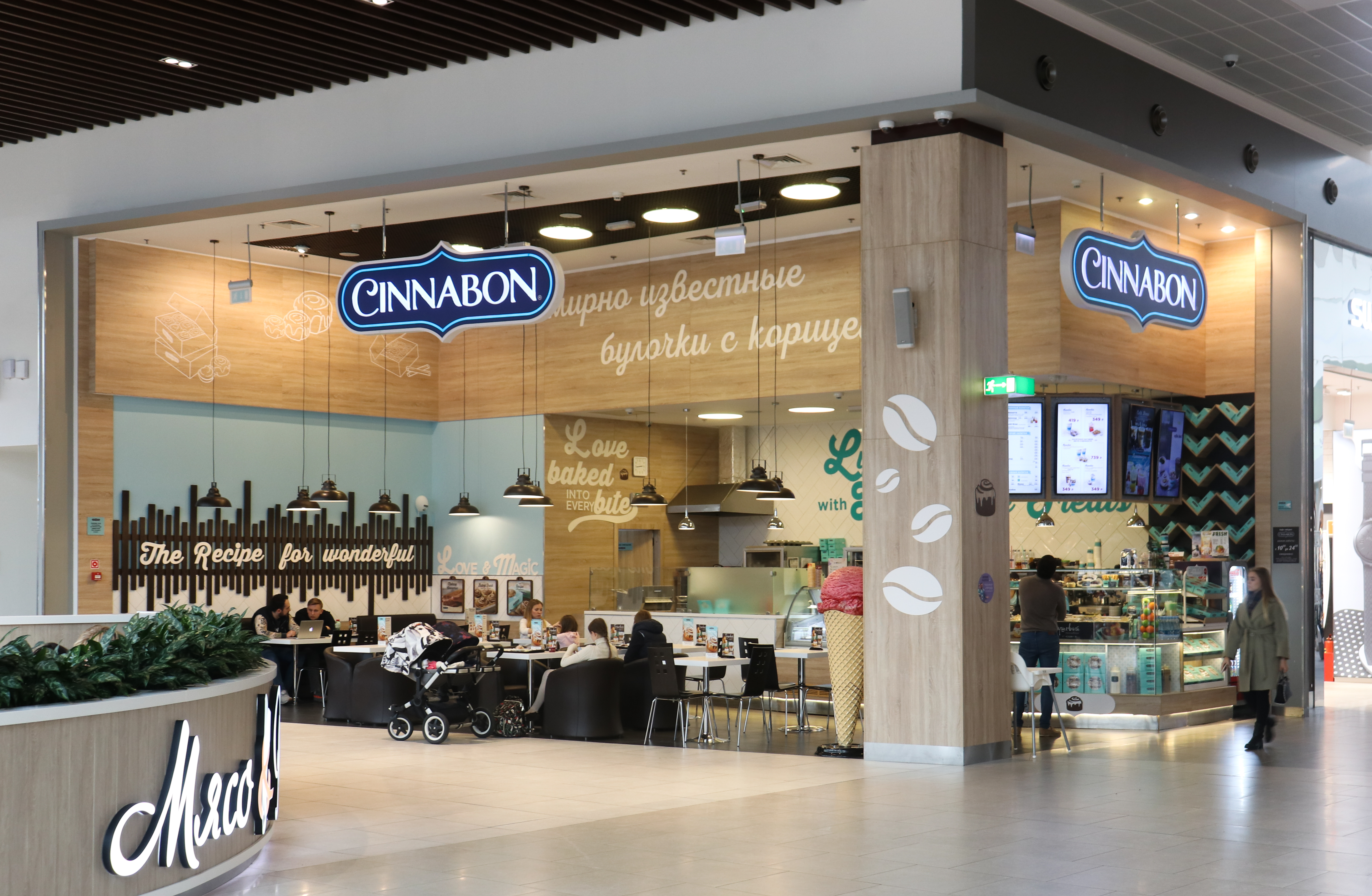 Кафе-пекарня Cinnabon в торговом центре Мега Тёплый стан в Москве